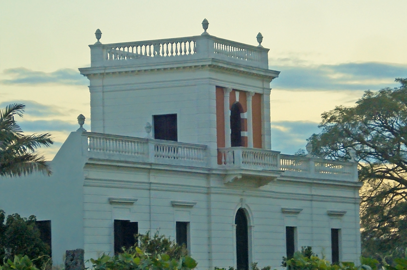 Casa del fundador de Colonia Ella (actual Malabrigo), Federico Carlos Sigel.